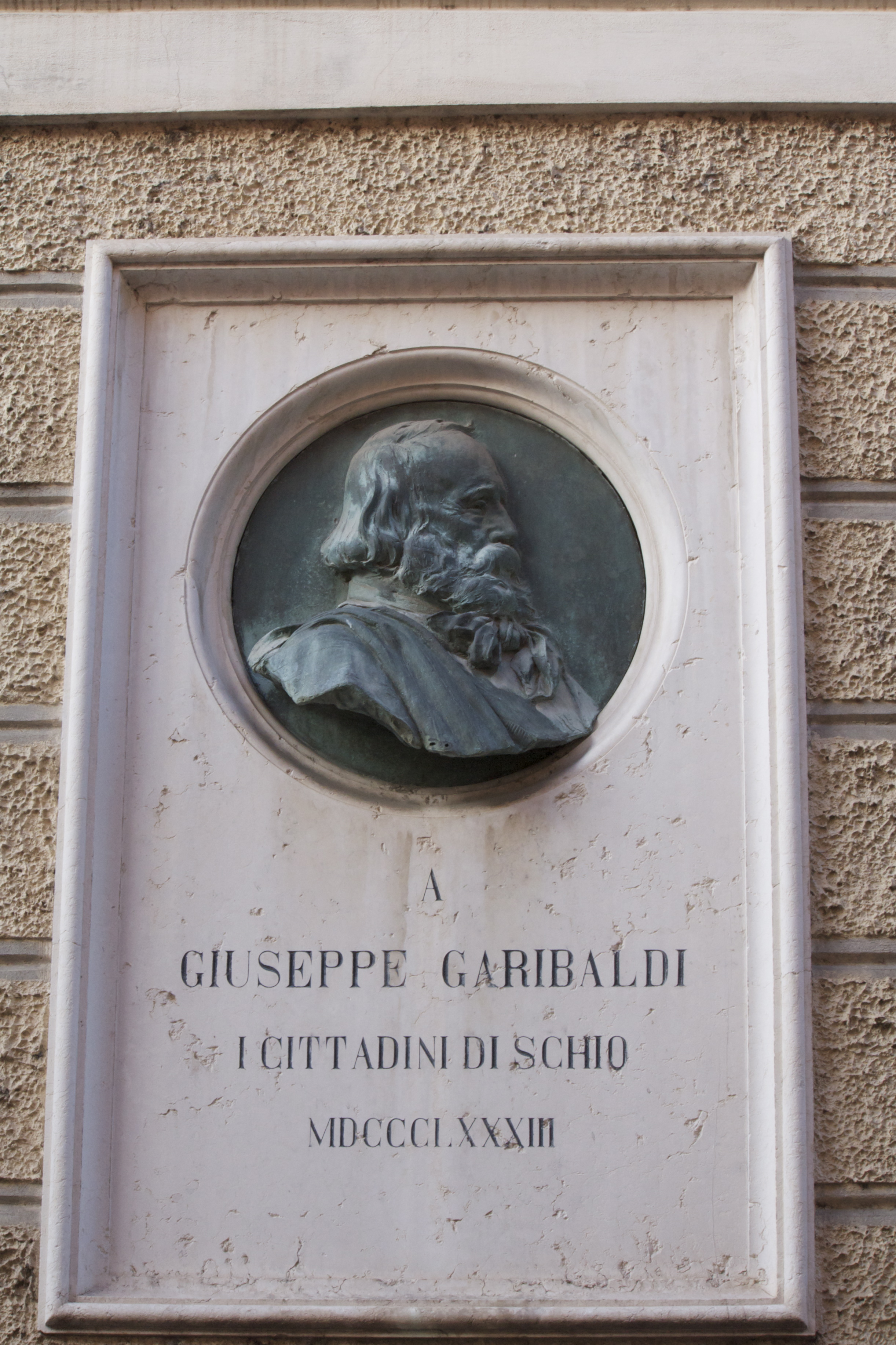 Schio, via Pasubio, palazzo Toaldi-Capra, lapide commemorativa con busto bronzeo di Giuseppe Garibaldi This is a photo of a monument which is part of cultural heritage of Italy.